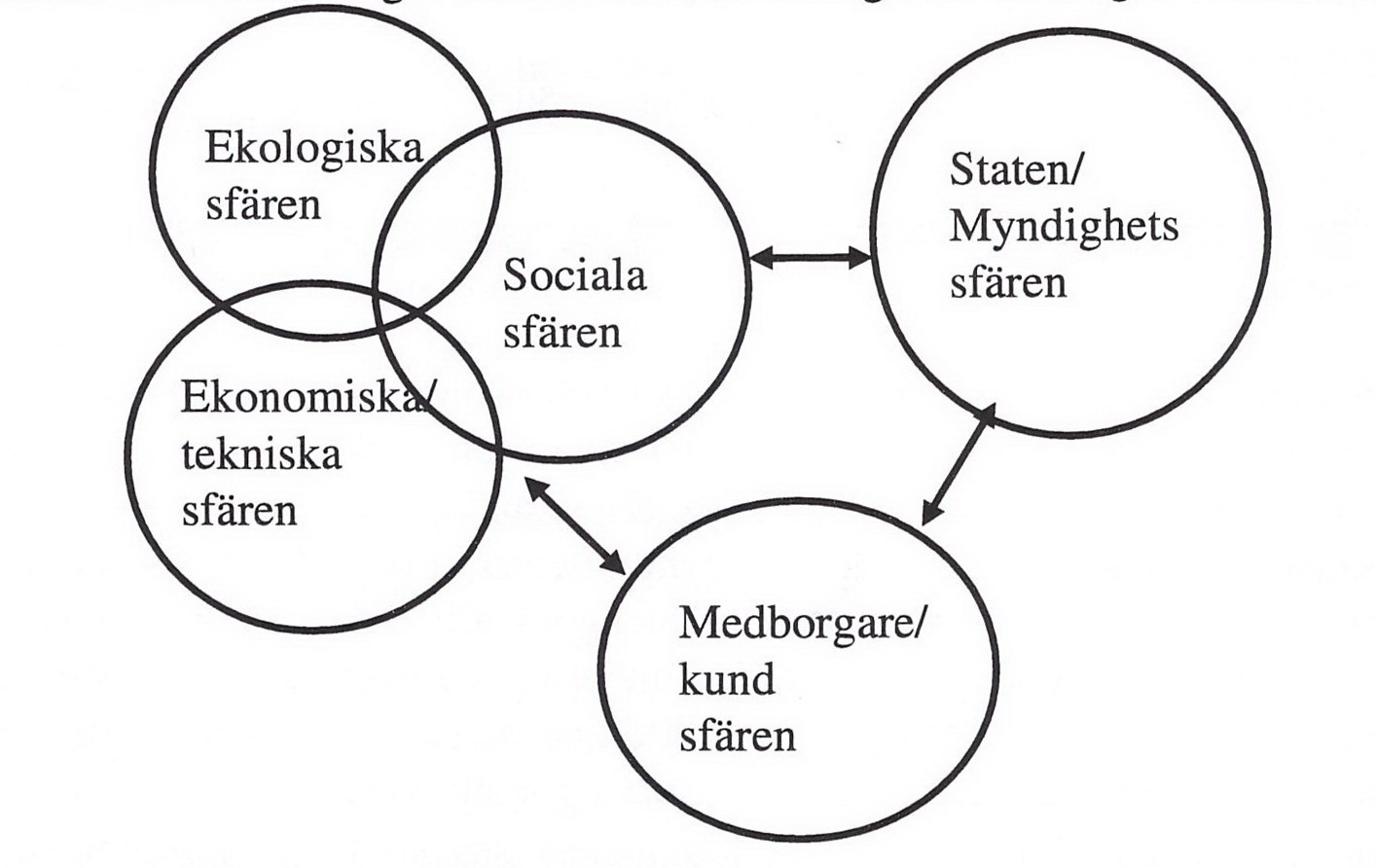 Olika vägar kan tas av samhället för att effektivisera användningen av naturens (ekologiska) resurser